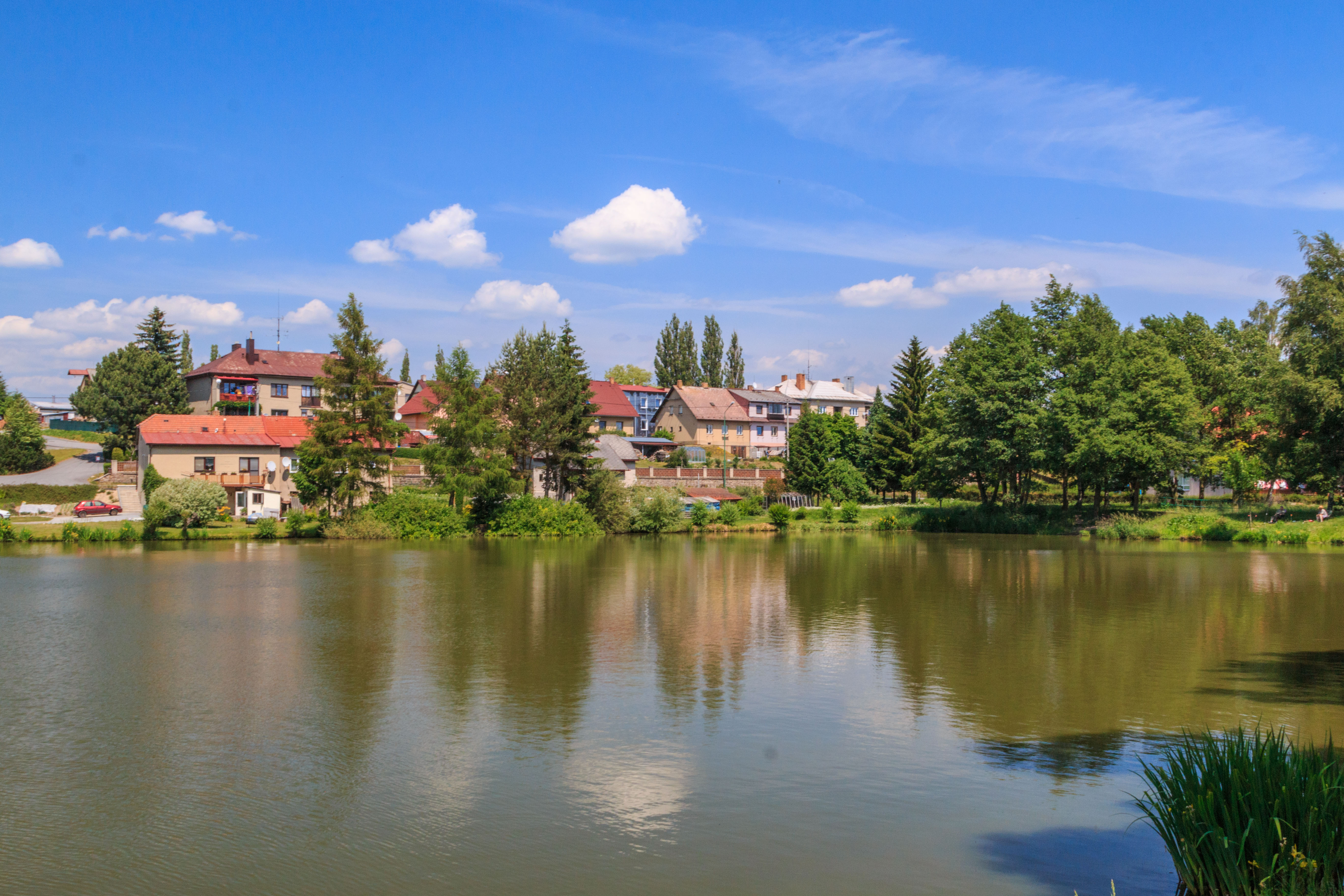 Pomezský rybník v Pomezí u Poličky Project: Vodstvo